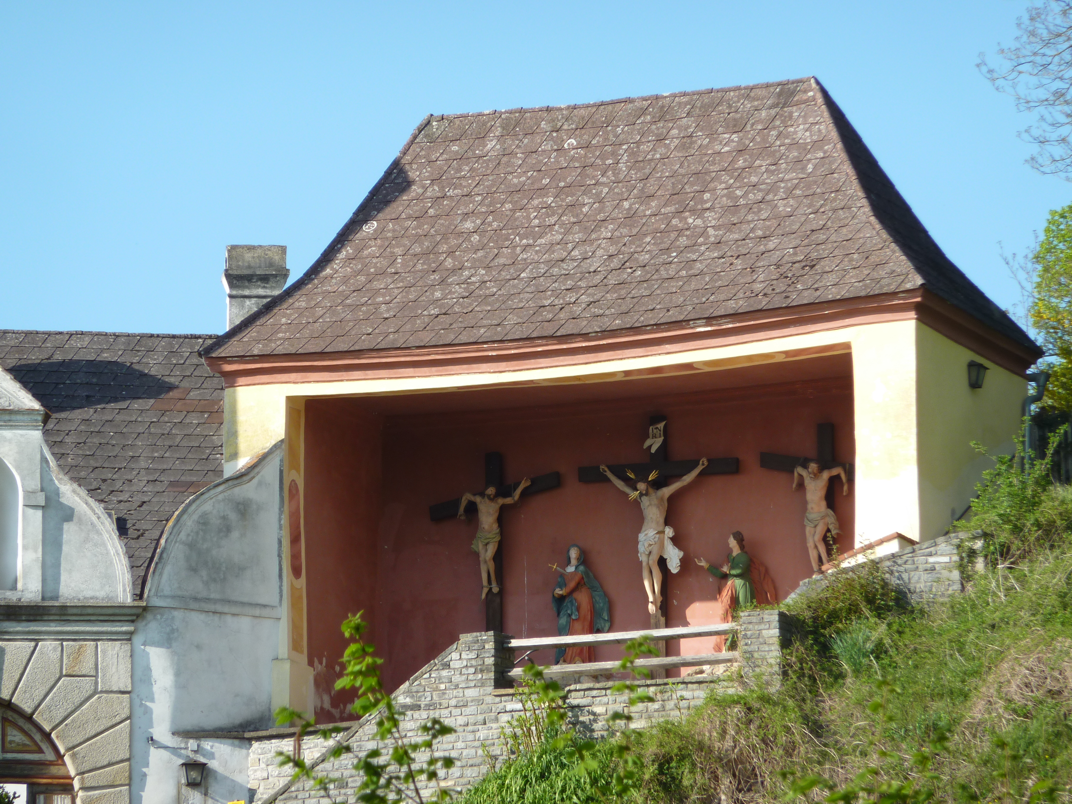 Servitenkloster, Schönbühel an der Donau 49, Schönbühel-Aggsbach, Niederösterreich - Kalvarienberg